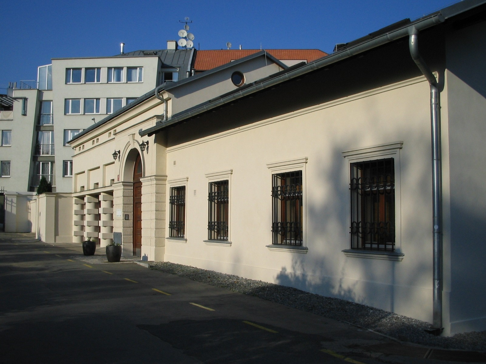 Havlíčkovy sady, vlastní